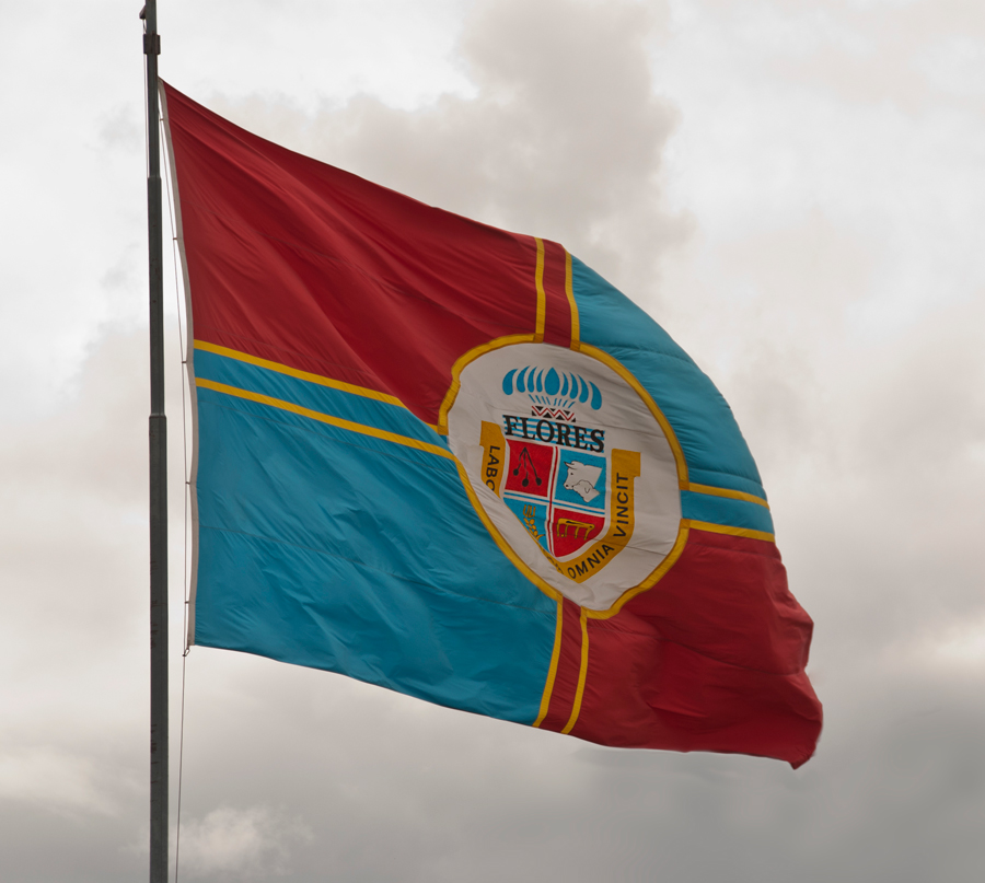 Bandera de Flores, visible al ingresar a la ciudad de Trinidad, Flores, Uruguay